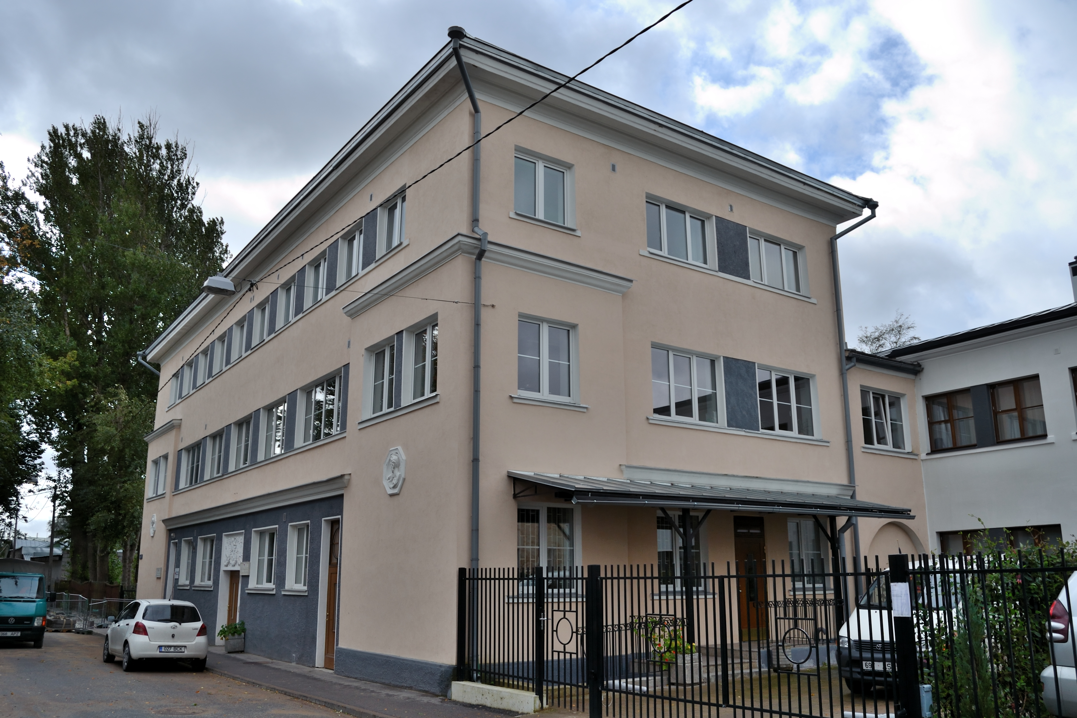 Tallinn, haiglahoone Eha 8 ja 8a 1945-1946